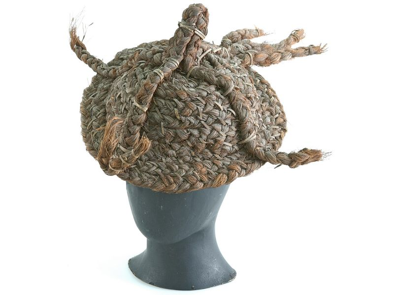 Hoofddeksel. . Krijgshoed van gevlochten kokosvezel